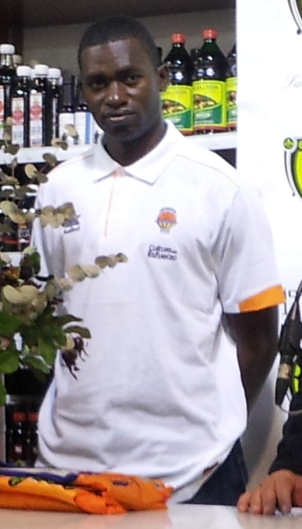 El jugador del València Basket Club, Romain Sato.